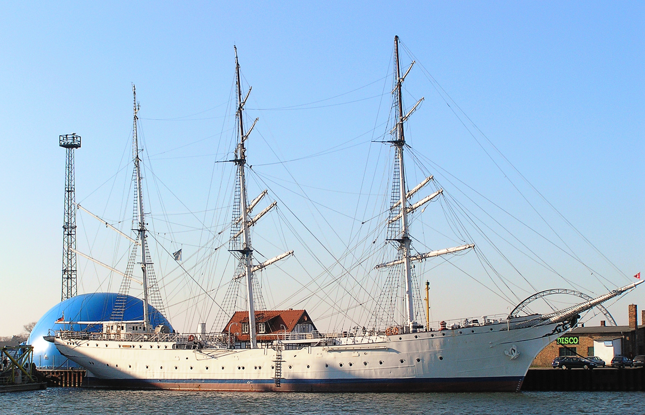 Beschreibung: Gorch Fock I in Stralsund. Links im Bild die Sonderausstellung Meereswelten zum Bau des Ozeaneums Stralsund. Fotograf: Darkone, 31. März 2005